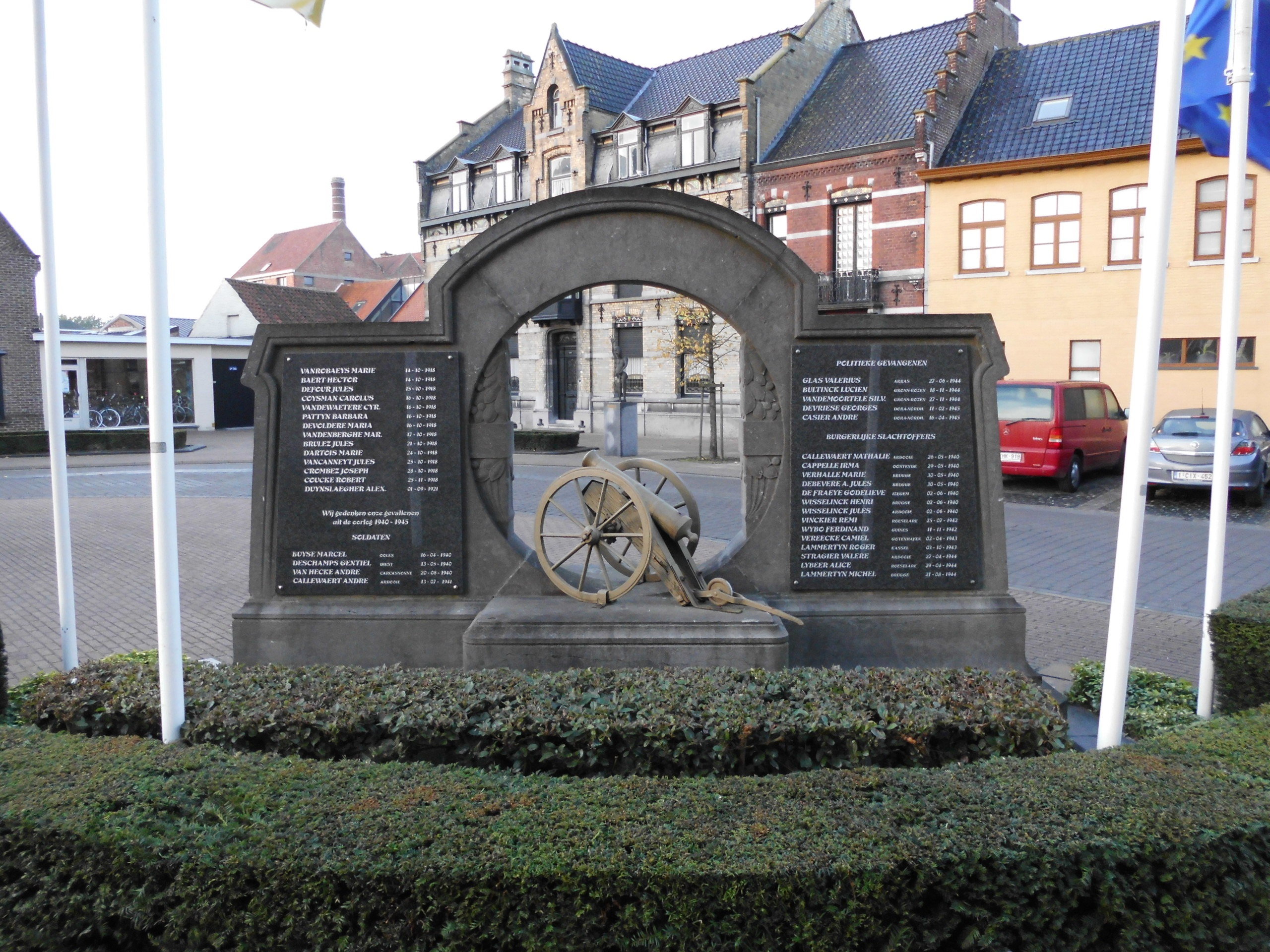 Monument Slachtoffers WO II - Marktpleinen nabij de kerk - Ardooie - West-Vlaanderen - België